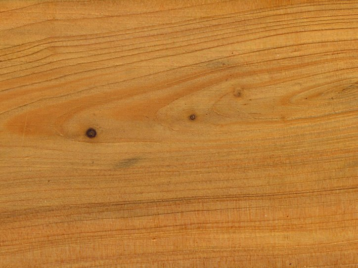 Juniperus communis, przekrój styczny przez drewno jałowca pospolitego